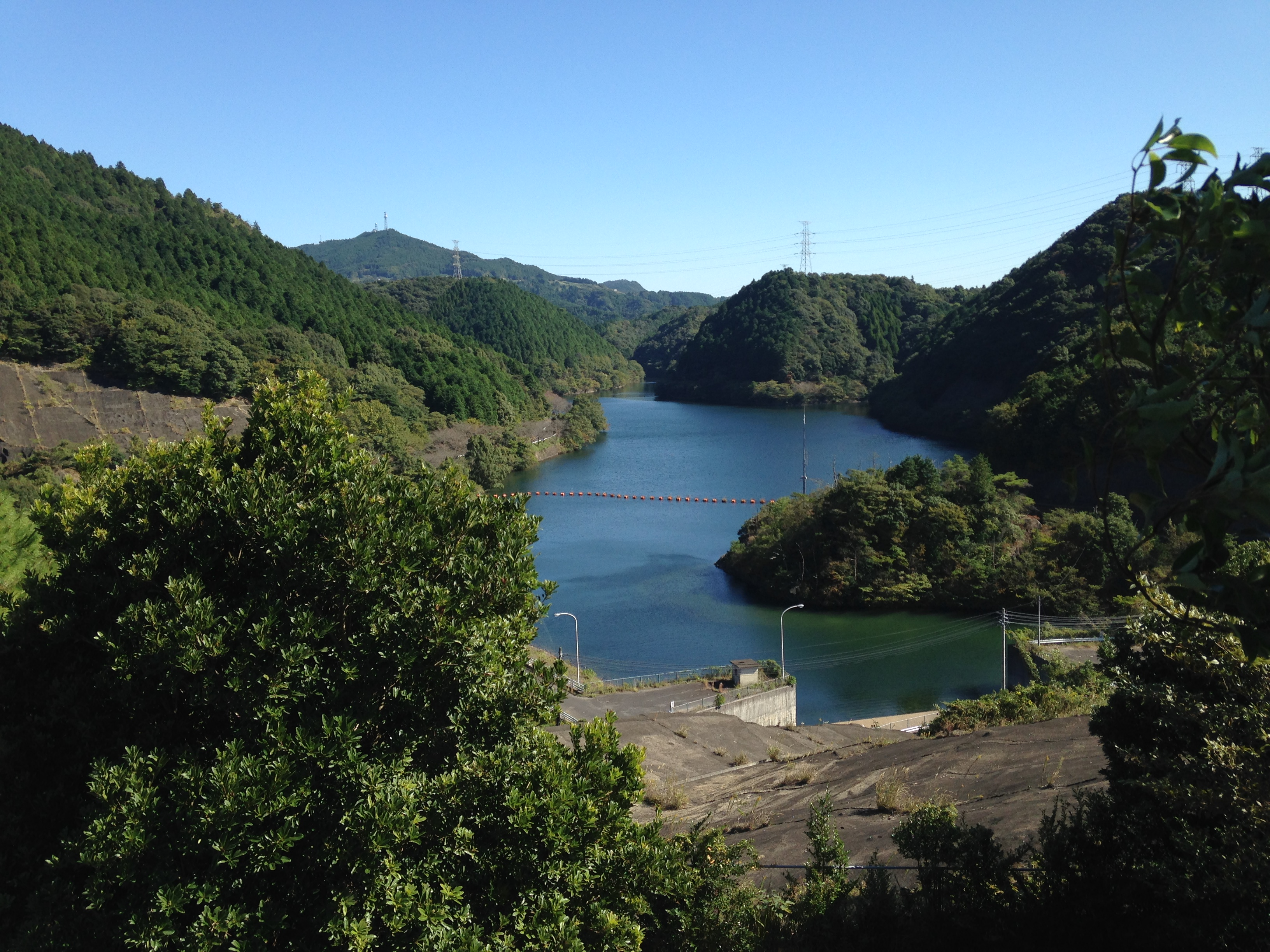 有田ポーセリンパークより望む古木場ダム湖